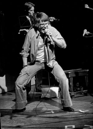 Joseph Paardenkracht